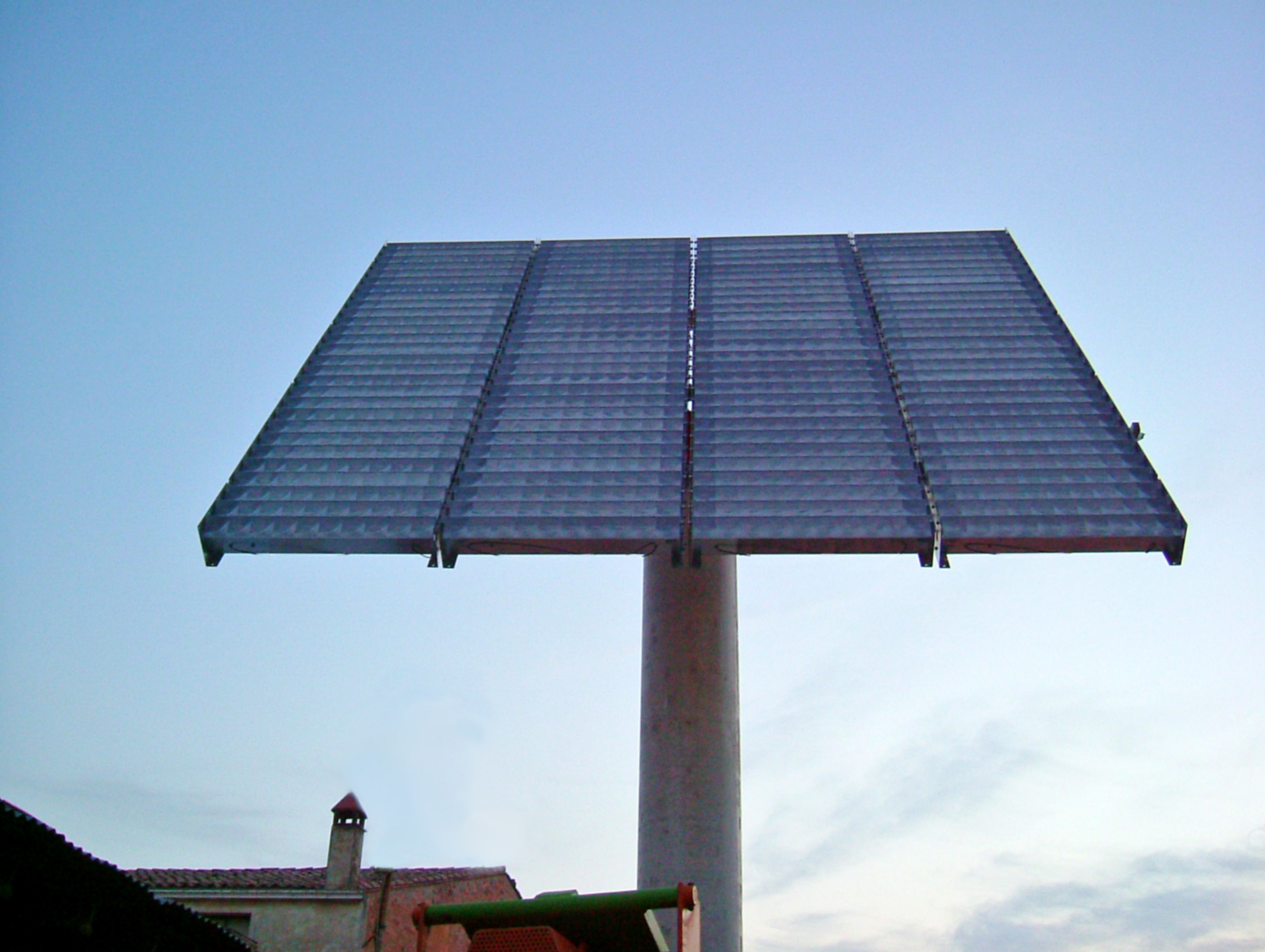 Planta de concentració fotovoltaica a Torregrossa (Lleida)